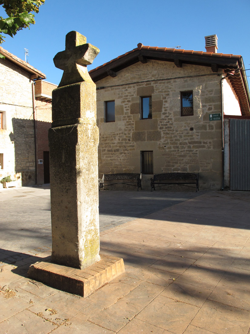 Plaza exterior junto a la iglesia de San Esteban en Salcedo (Álava, España)